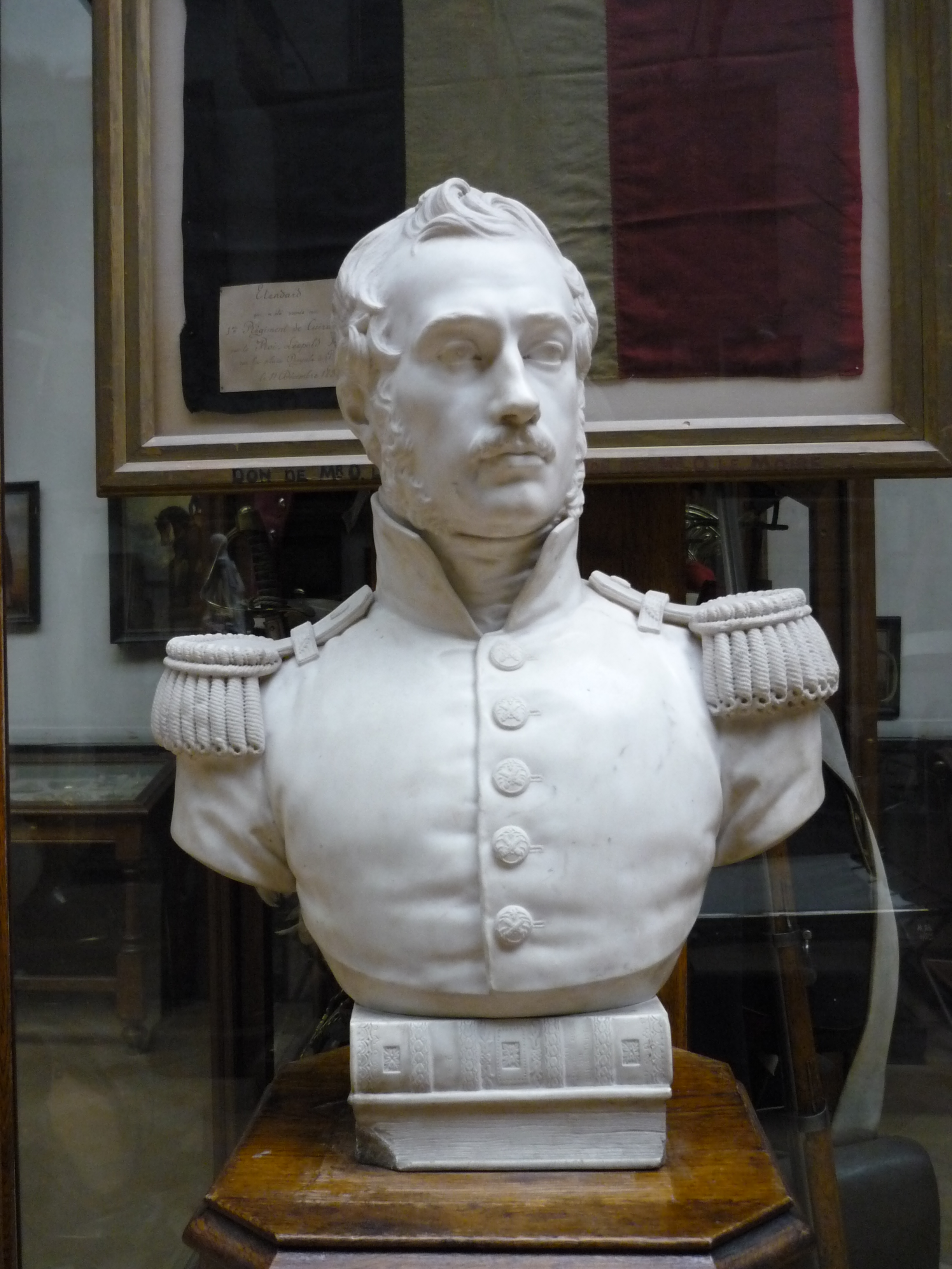 Buste de Charles de Brouckère, Musée du Cinquantenaire, Bruxelles, Belgique. Royal Museums of Art and History Native nameMusées royaux d’art et d’histoireLocationBrusselsCoordinates50° 50′ 25.85″ N, 4° 23′ 35.37″ E Established1835Web page control : Q945059 VIAF: 147671754 ISNI: 0000 0001 2342 957X GND: 1006854-5 SUDOC: 162391722 institution QS:P195,Q945059